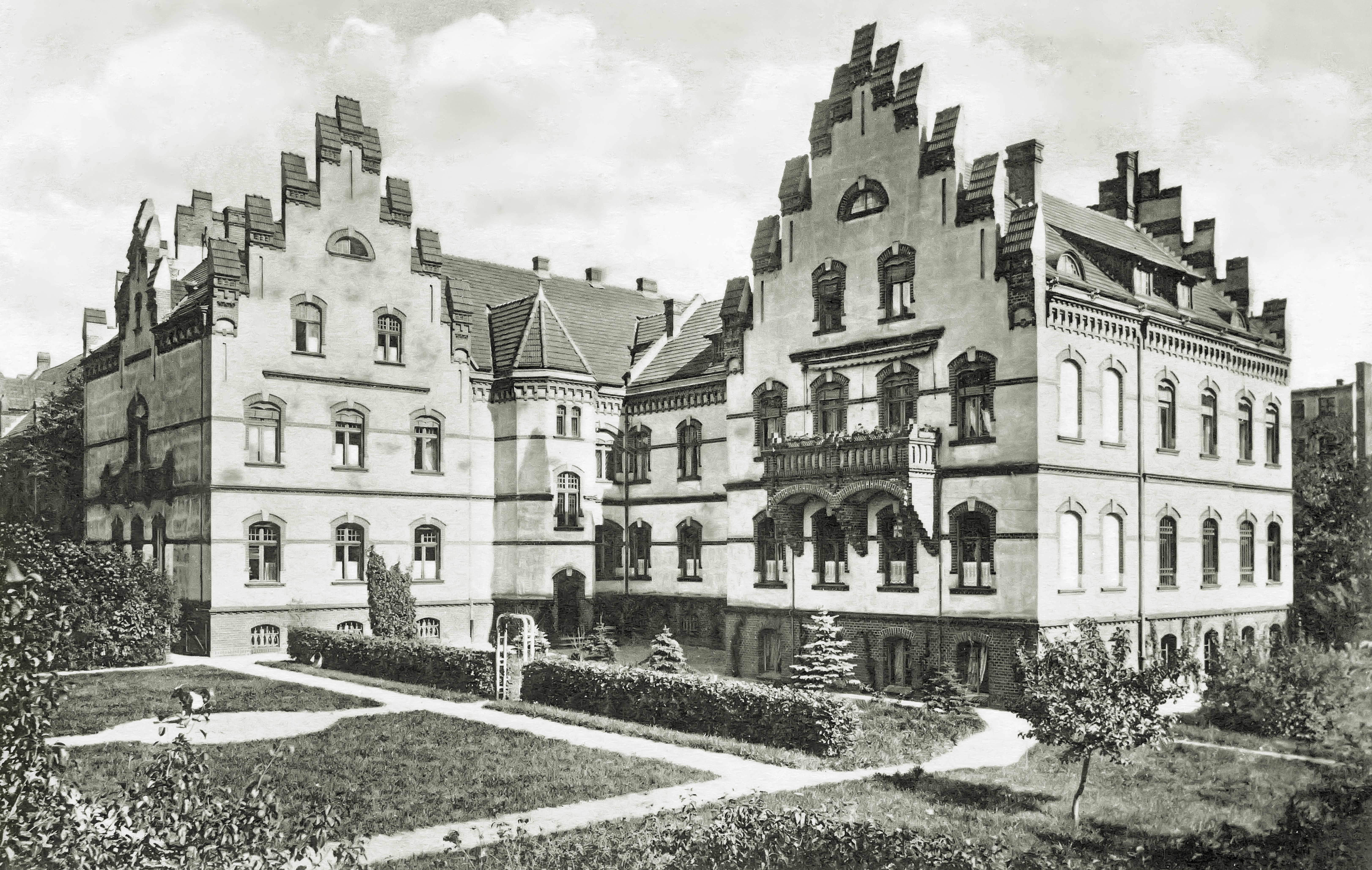 Kreishaus des Kreises Insterburg, amtlich: Preußisches Landratsamt, unterstellt dem Regierungspräsidenten Gumbinnen, Albrechtstr. 17, Insterburg